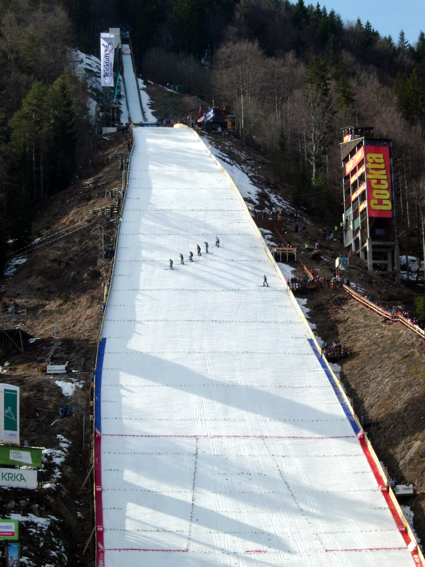 Letalnica in Planica, Ratece, Kranjska Gora